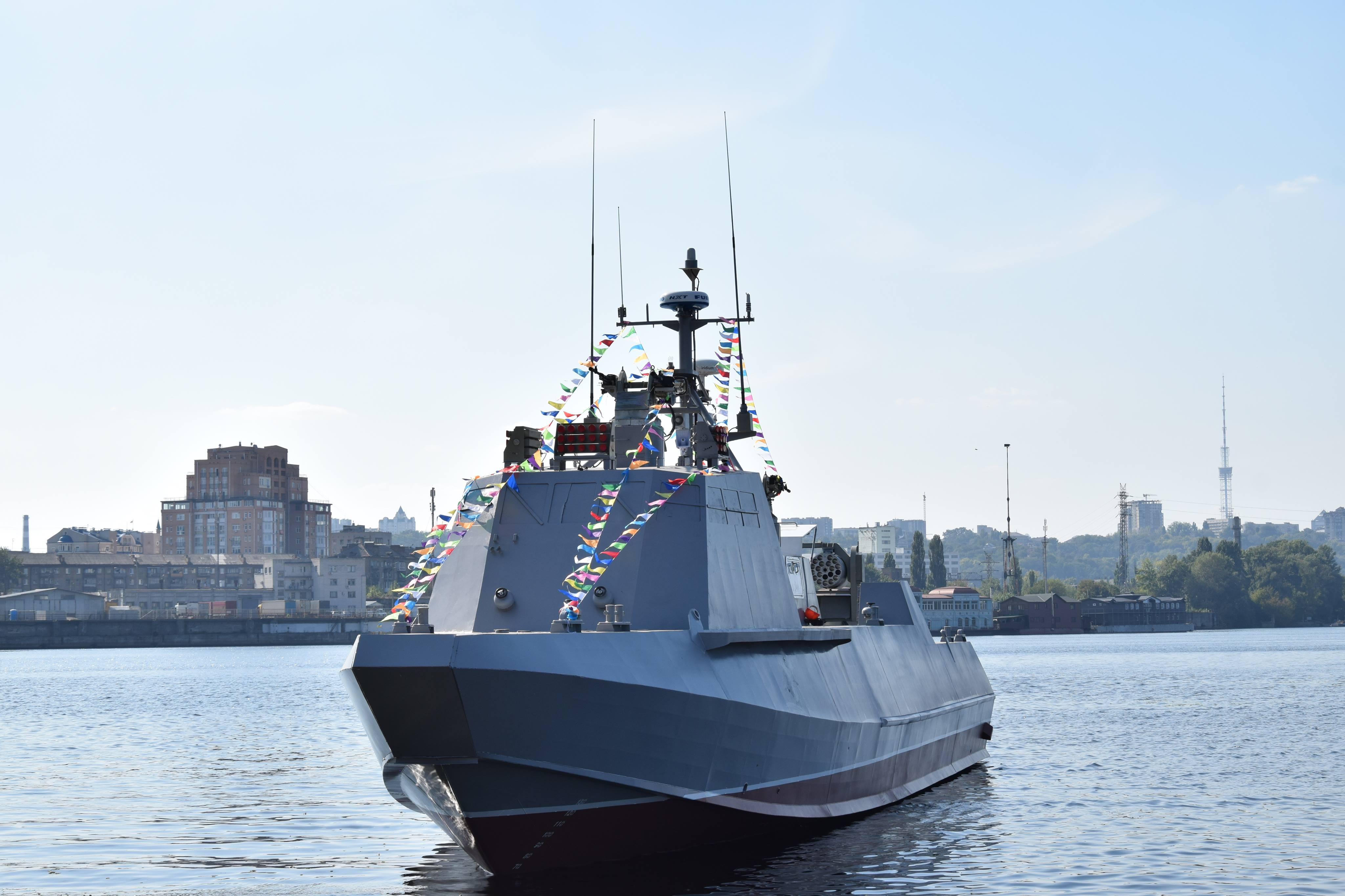 20 вересня, у Києві відбувся спуск на воду ще одного десантно-штурмового катера «Кентавр». Нові бойові одиниці побудовано на Київському суднобудівному заводі ПрАТ «Завод «Кузня на Рибальському» на замовлення Міністерства оборони України для Військово-Морських Сил ЗС України. – «Кентавр» – це вже другий проект вітчизняних катерів, який був розроблений і побудований саме незалежною Україною, – зазначив начальник штабу - перший заступник командувача Військово-Морських Сил ЗС України контр-адмірал Андрій Тарасов. – Цей катер започаткував серію таких бойових одиниць, ми вже маємо два спущених на воду катери та очікуємо на продовження, – додав він. Символічно, хрещеною мамою десантно-штурмового катеру, призначеного для висадки підрозділу морського десанту на необладнане узбережжя, стала військовослужбовець морської піхоти Військово-Морських Сил ЗС України старшина Юлія Мединська. В Криму, жінка проходила службу в 1 окремому Феодосійському батальйоні морської піхоти. У 2014 році з любов’ю до України й жагою до перемоги над агресором, Юлія в складі свого підрозділу вийшла на материкову частину Батьківщини й продовжила виконувати завдання за призначенням. І сьогодні вона стала оберегом нової флотської бойової одиниці. Спуск катерів у цьому році є продовженням будівництва серії катерів в рамках Державної цільової програми розвитку озброєння і військової техніки на період до 2021 року для Військово-Морських Сил ЗС України з метою нарощування сил оборони України з приморського напрямку. Прес-центр Командування ВМС ЗС України